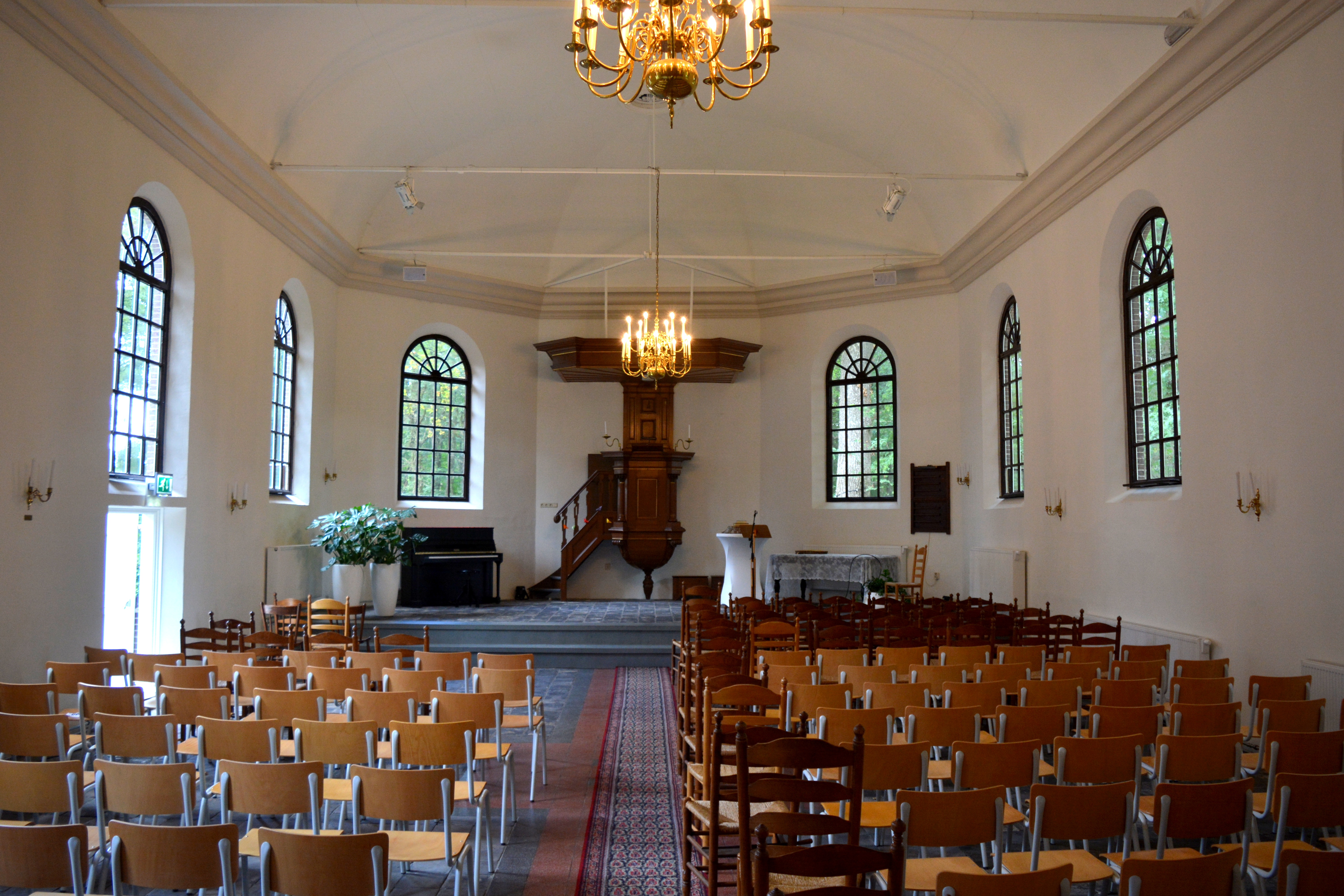 Wilhelminaoard, Koloanjetsjerke, ynterieur